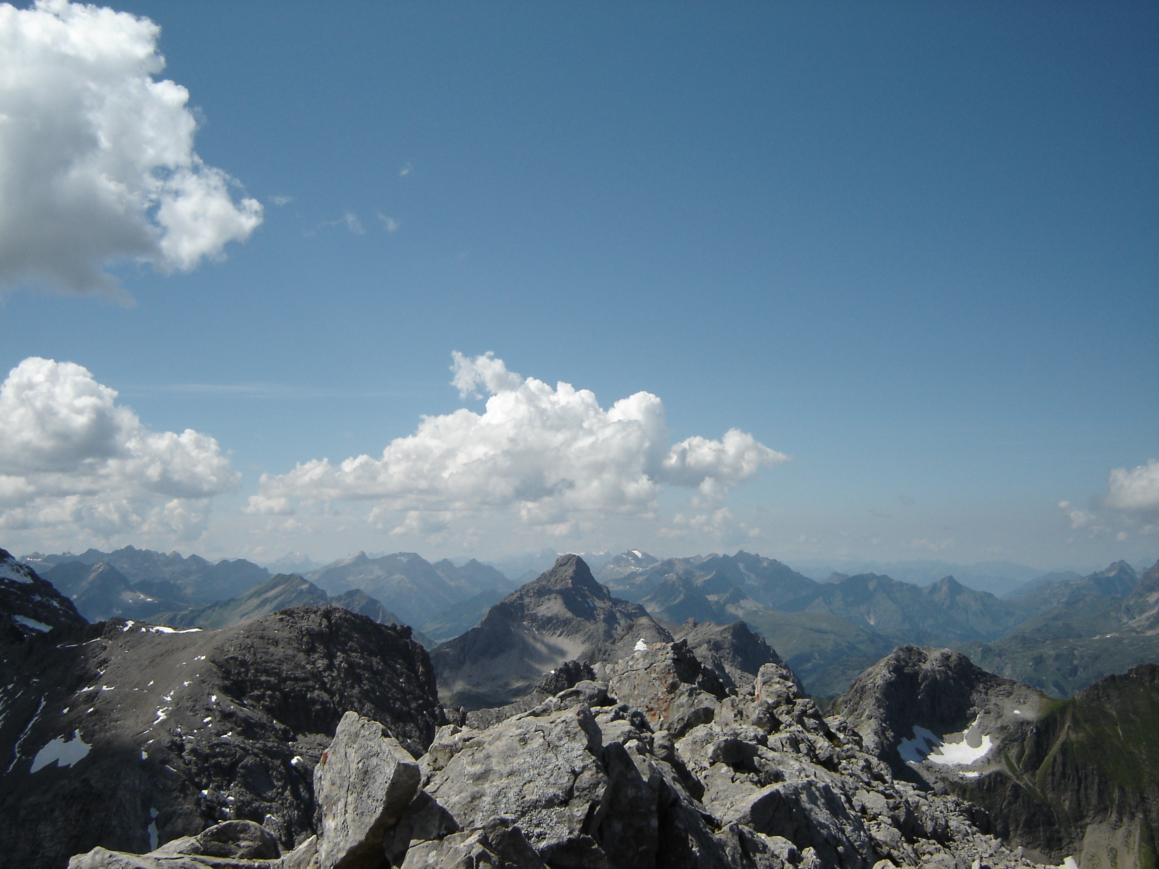 Biberkopf vom Heilbronner Weg aus gesehen